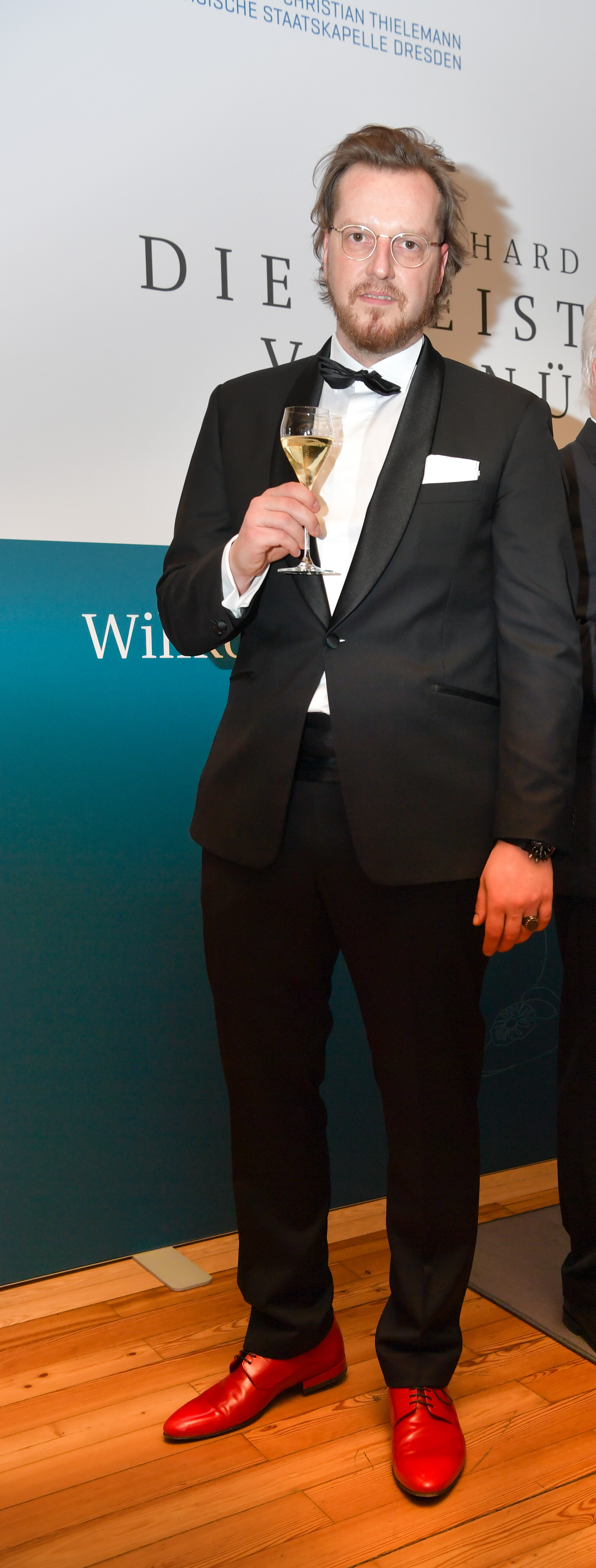 Ron Flieger bei den Salzburger Osterfestspielen 2019